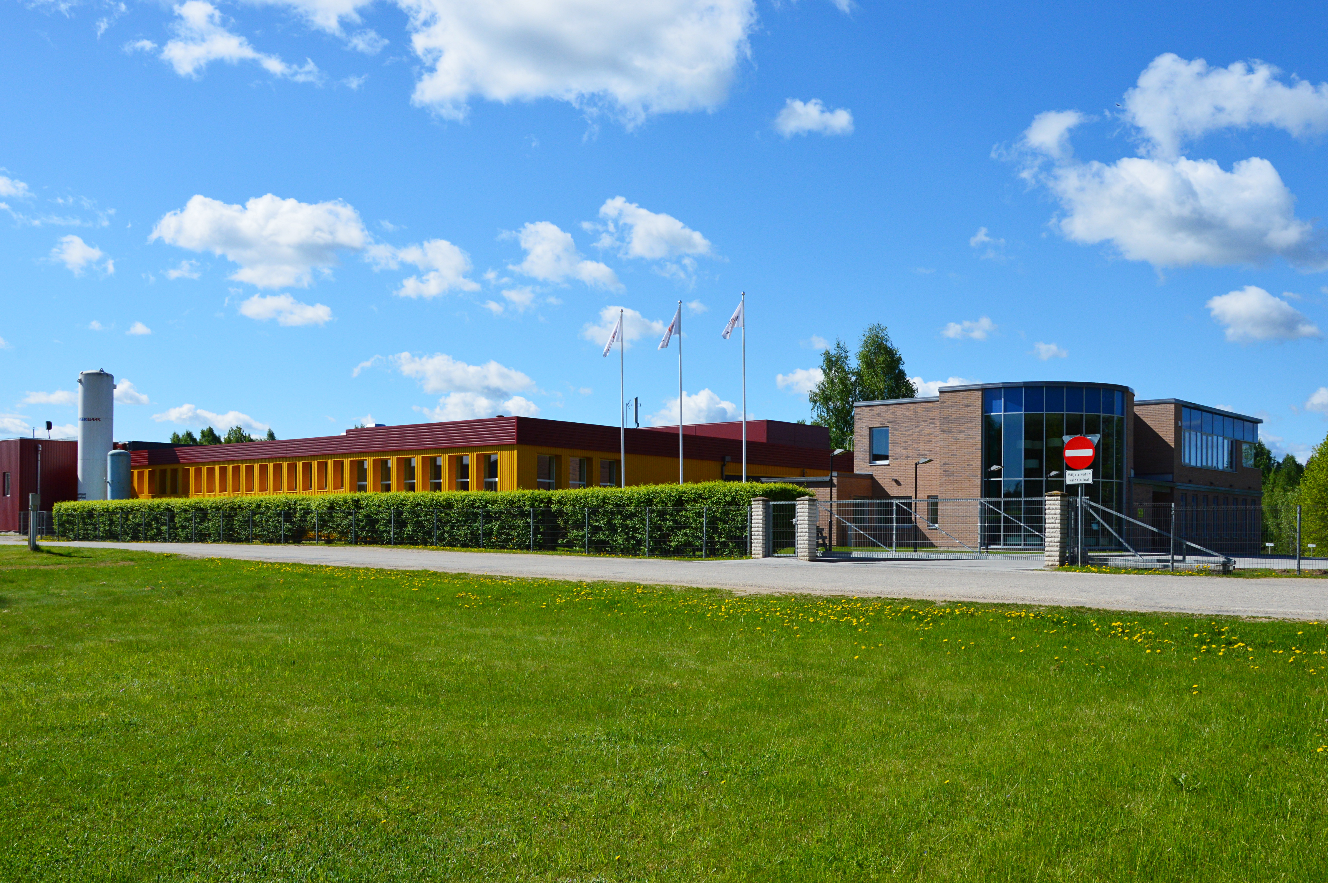 Värska Vesi AS tootmishoone Värska aleviku lõunapiiril.